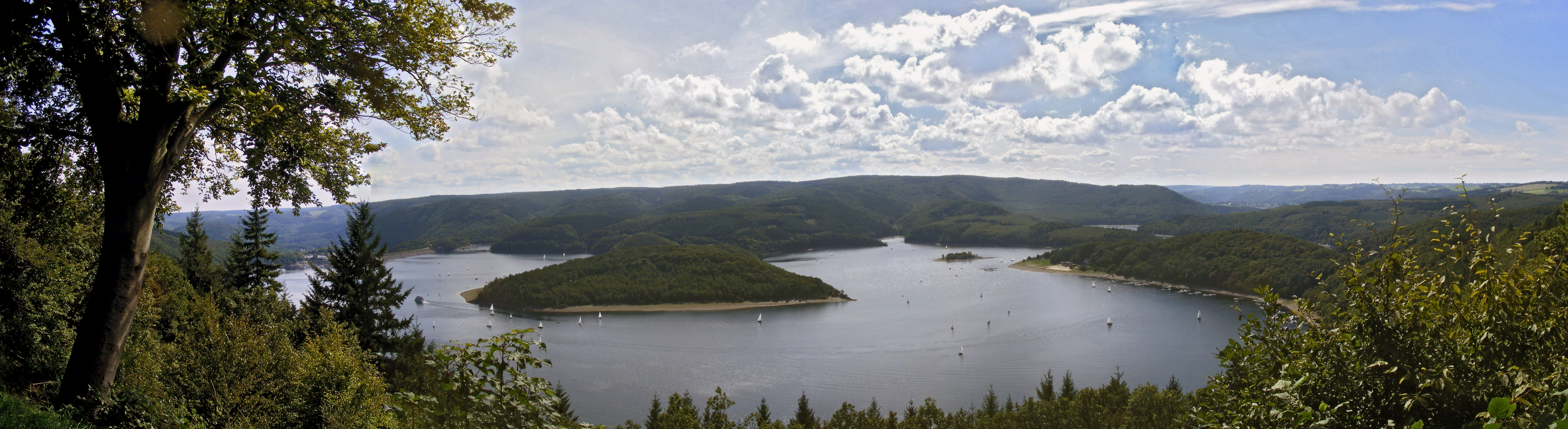 Panorama Rursee von Schmidt aus gemacht 2010